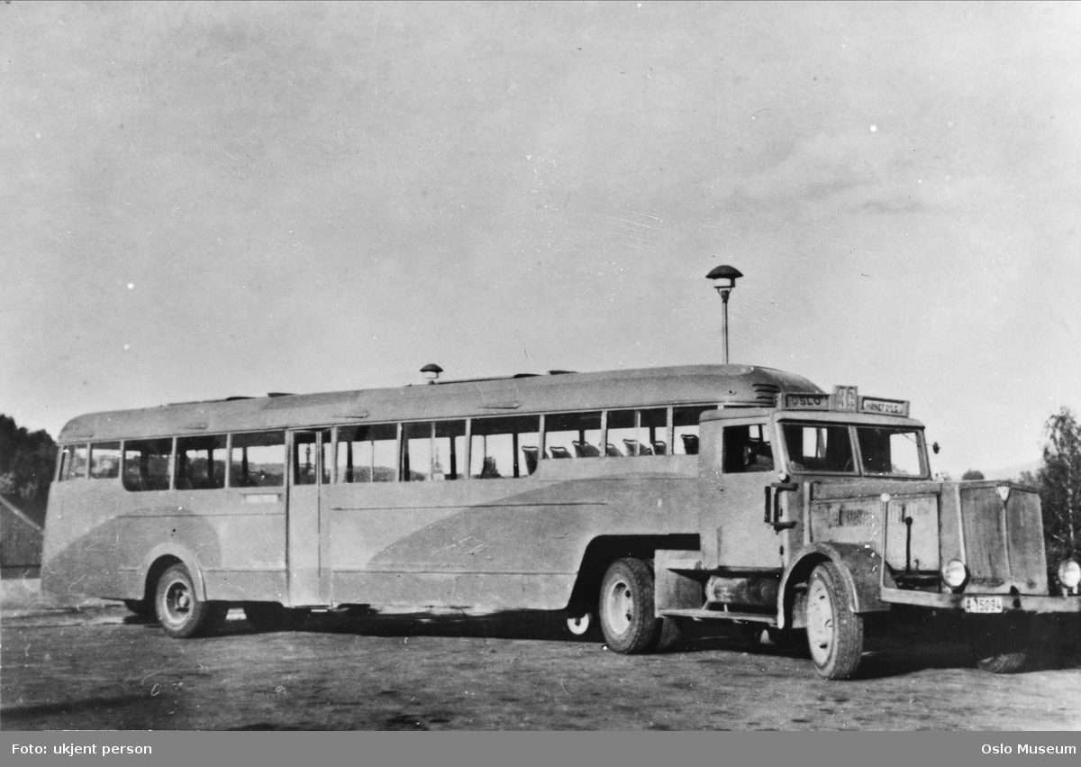 Bussen "Ormen lange", bygd som semitrailer. Bussen gikk i trafikk mellom Oslo og Hønefoss på 1940-tallet. Påbygget var levert av Hønefoss Karosseri.